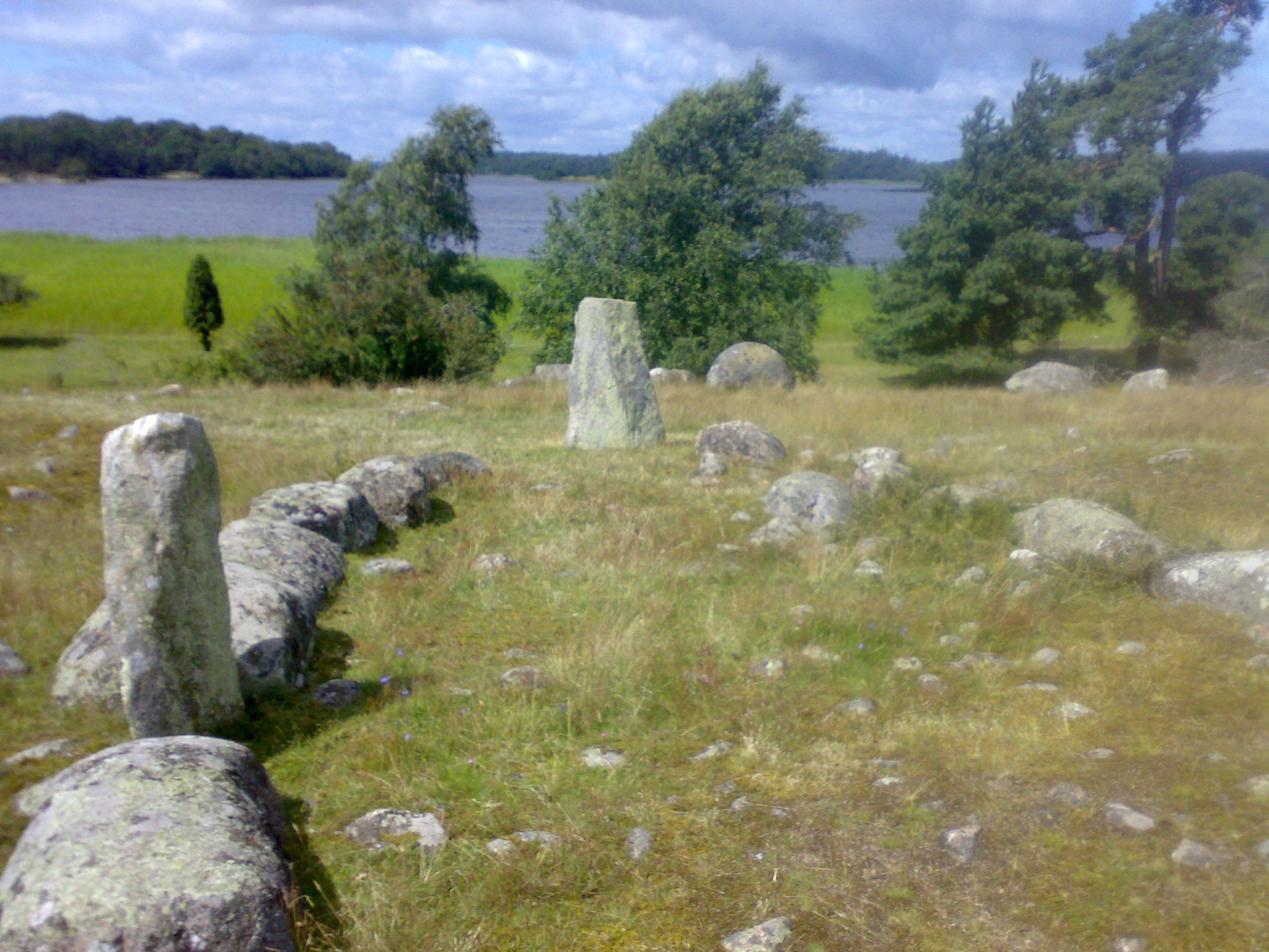 Hjortahammar, Blekinge, Sweden